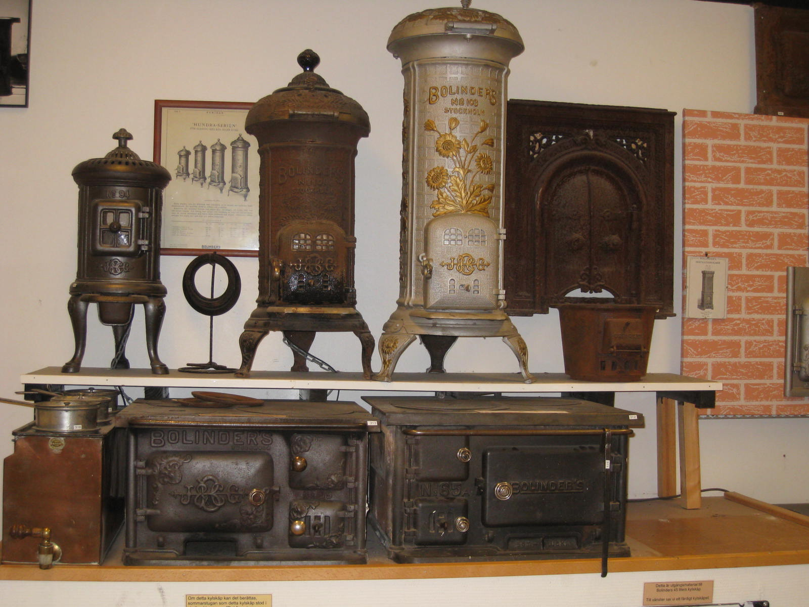 Bolindermuseet, Folkets hus, Kallhäll, kaminer i Hundraserien och järnspisar från Bolinders Mekaniska Verkstad.